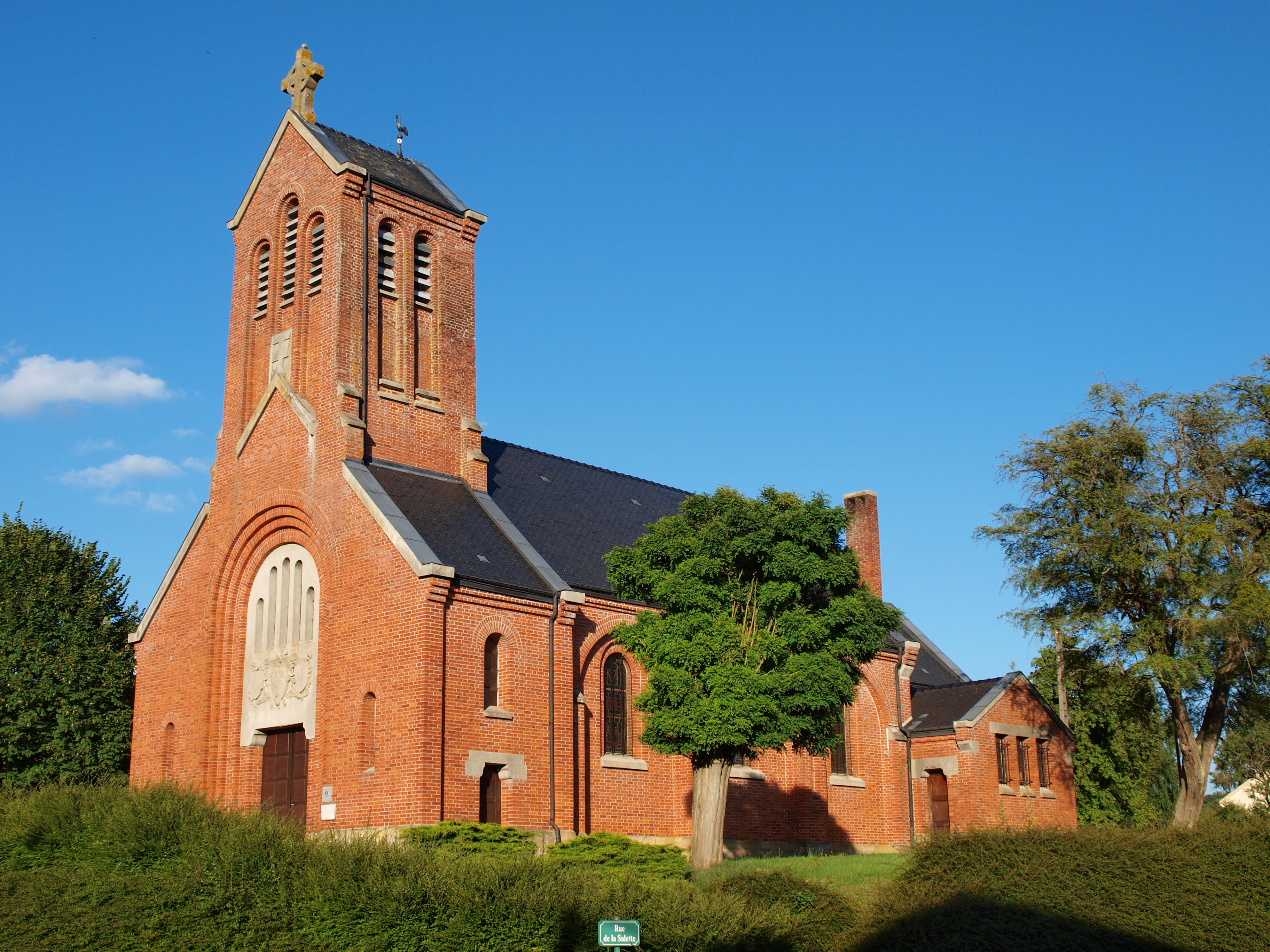 Église Notre-Dame de Ballay (Ardennes, France)